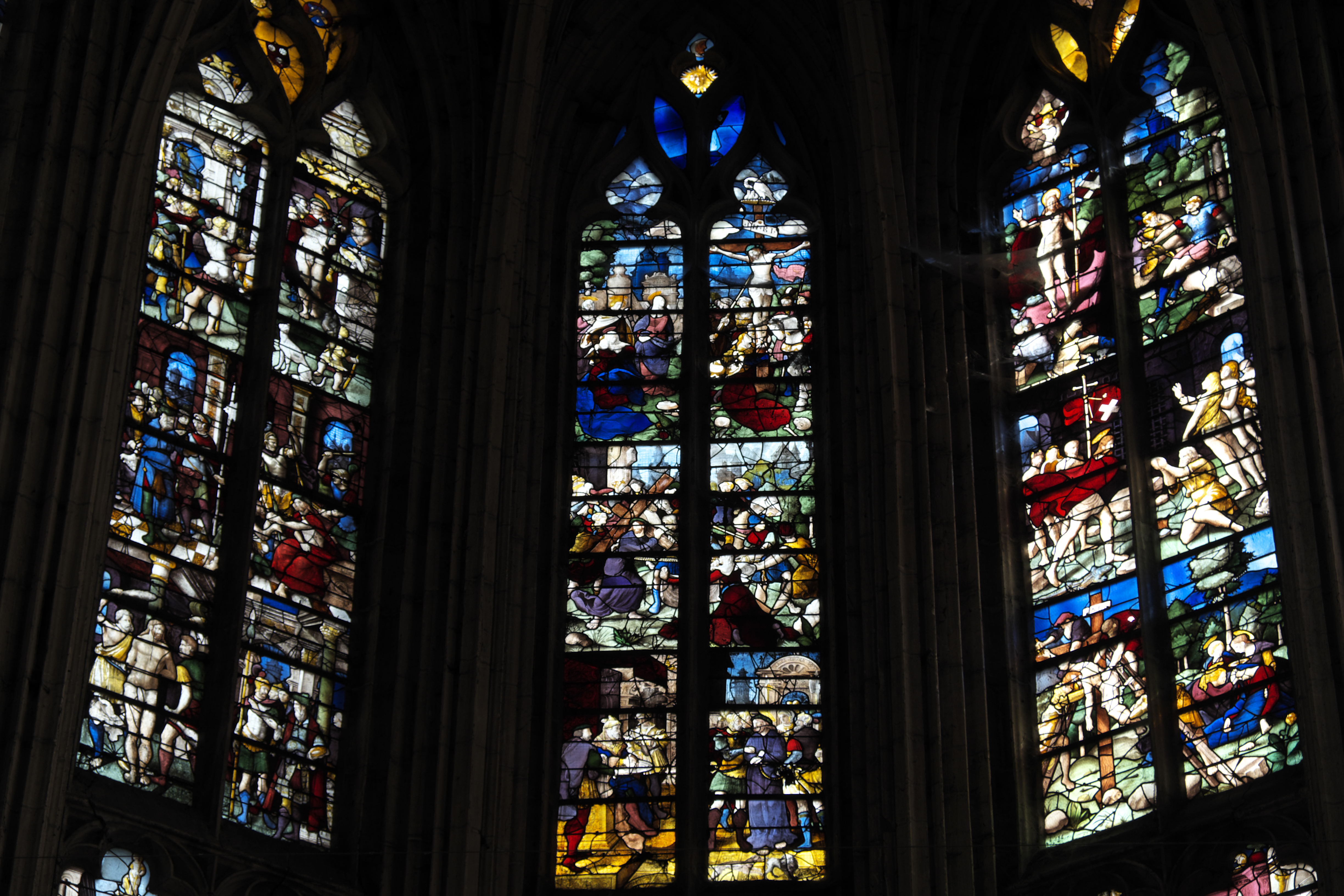 Katholische Kirche Sainte-Foy in Conches-en-Ouche im Département Eure (Haute-Normandie/Frankreich), Bleiglasfenster aus der 1. Hälfte des 16. Jahrhunderts im Chor; Darstellung: Passion Christi